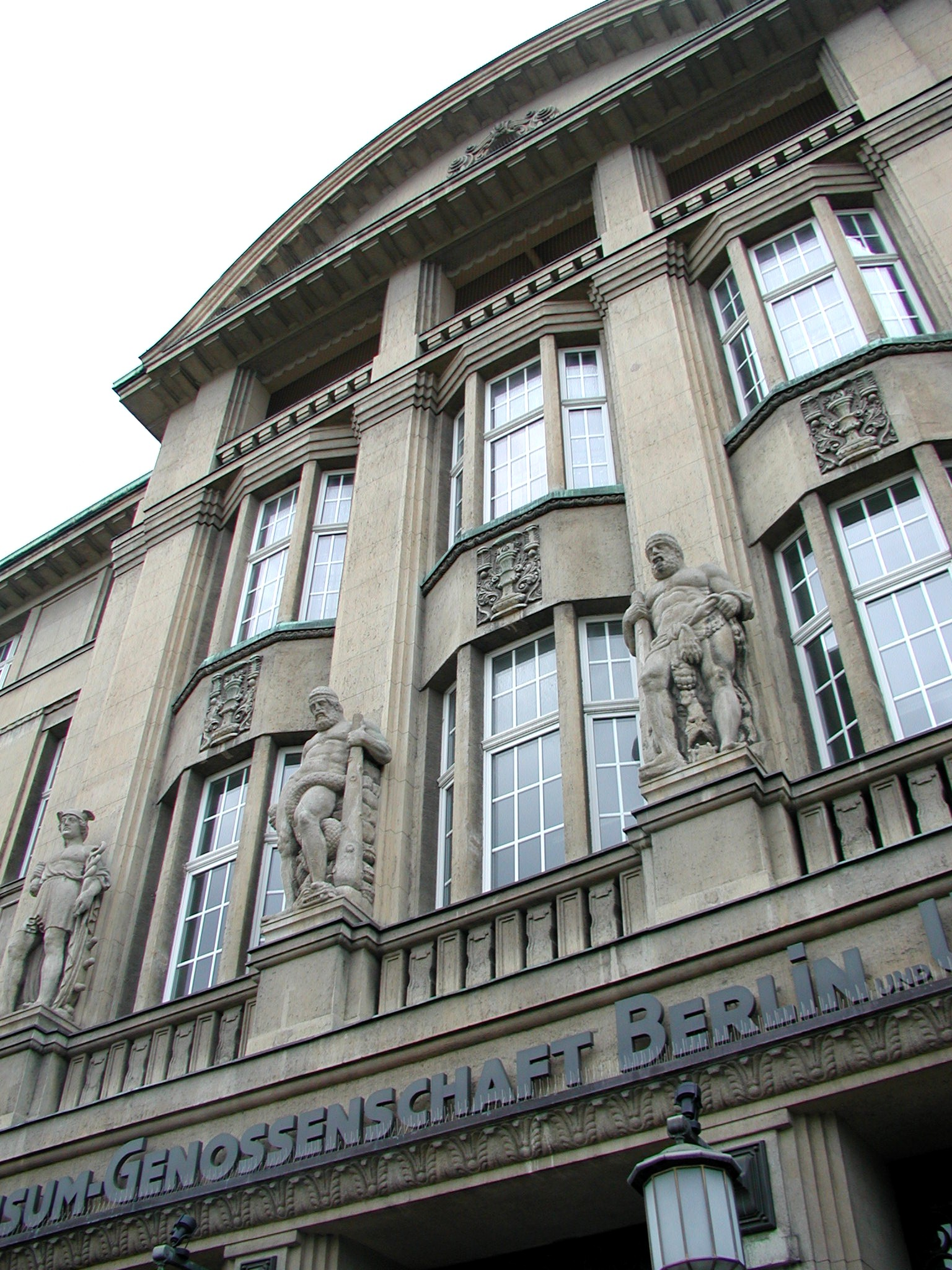 Mittelteil des Verwaltungsgebäudes der Konsumgenossenschaft